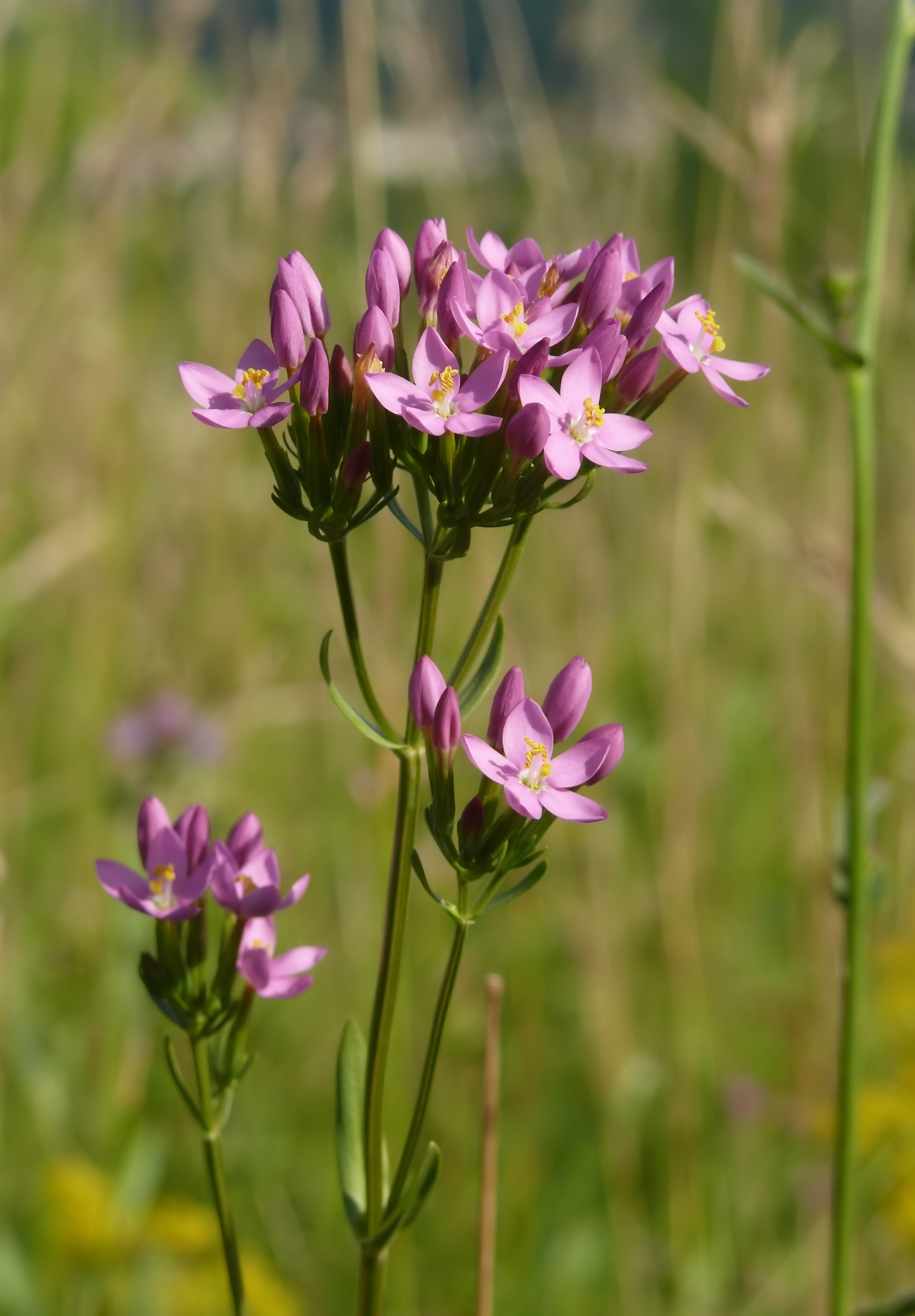 Centaurium erythraea, Hohenlohe, Deutschland